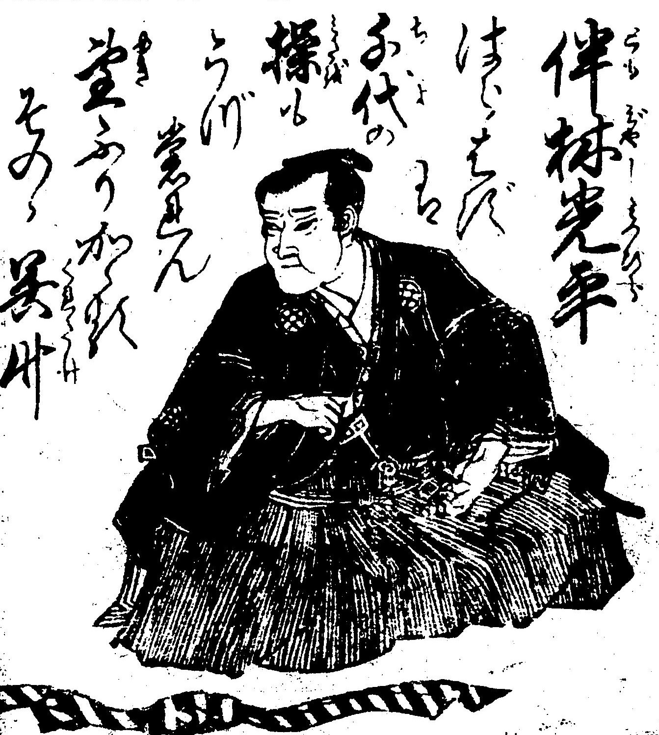 伴林光平の肖像。